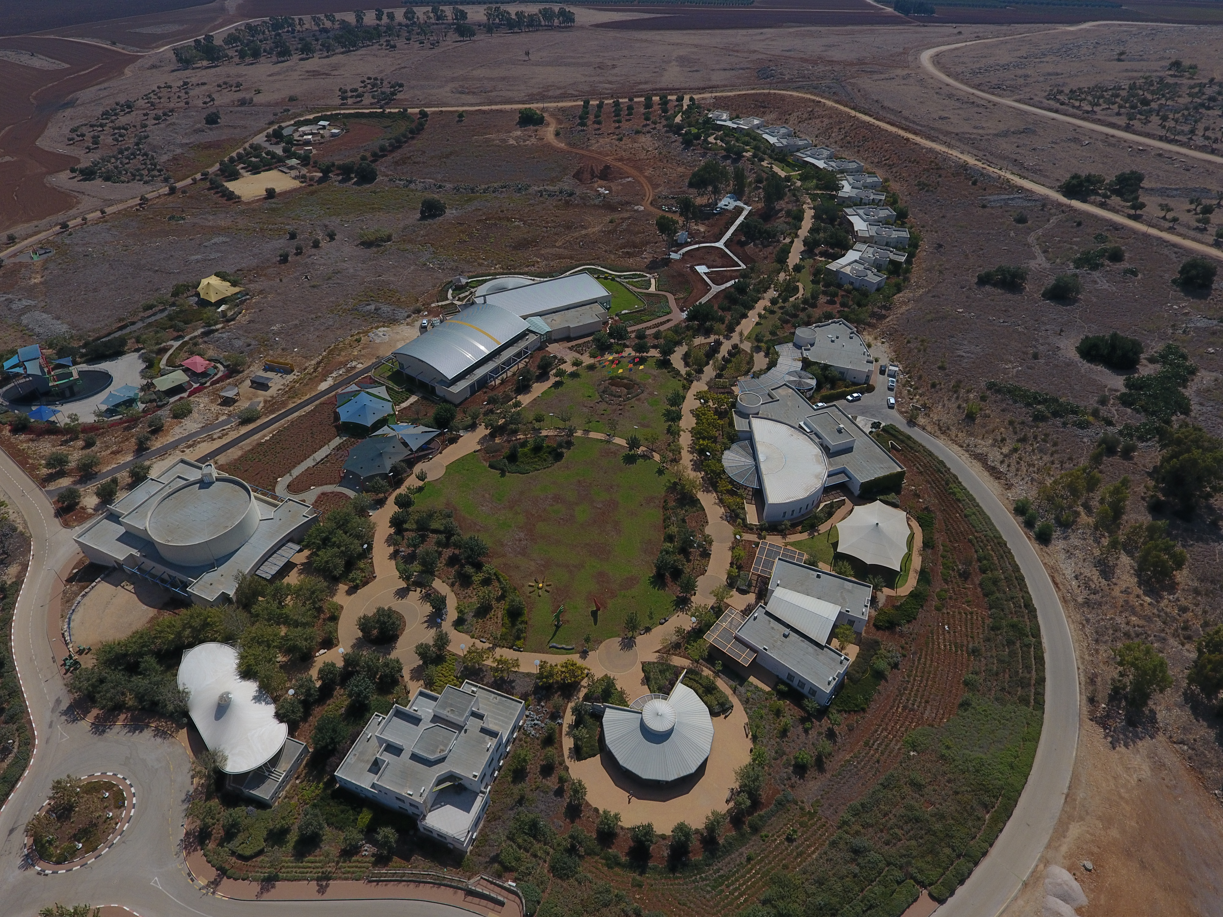 מבני הכפר